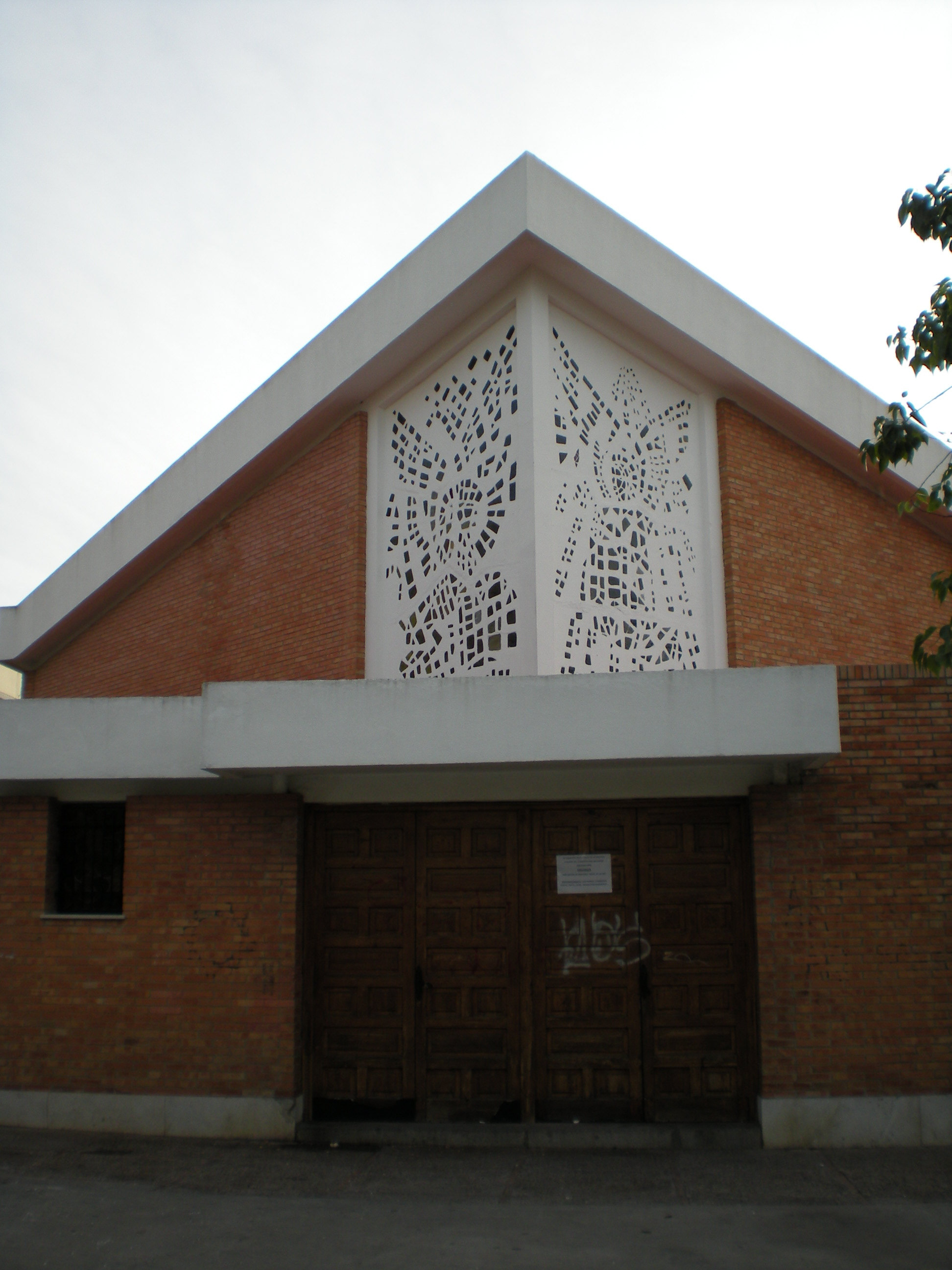 Puerta lateral de la Iglesia de Ntra. Sra. de Fátima en Jerez de la Fronteral (Cádiz - España)